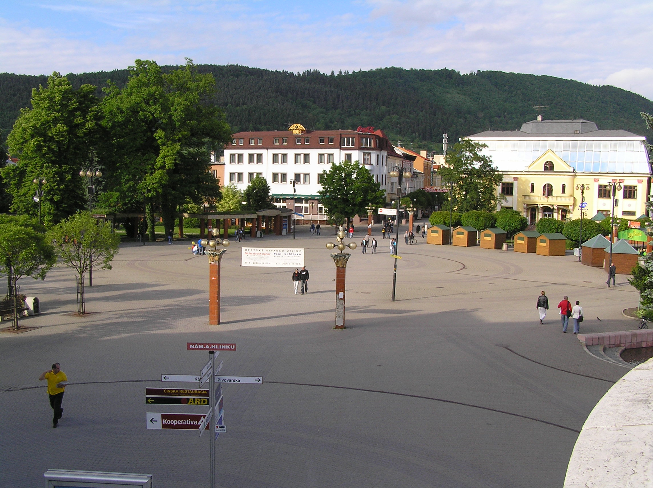 Žilina, Námestie A. Hlinku